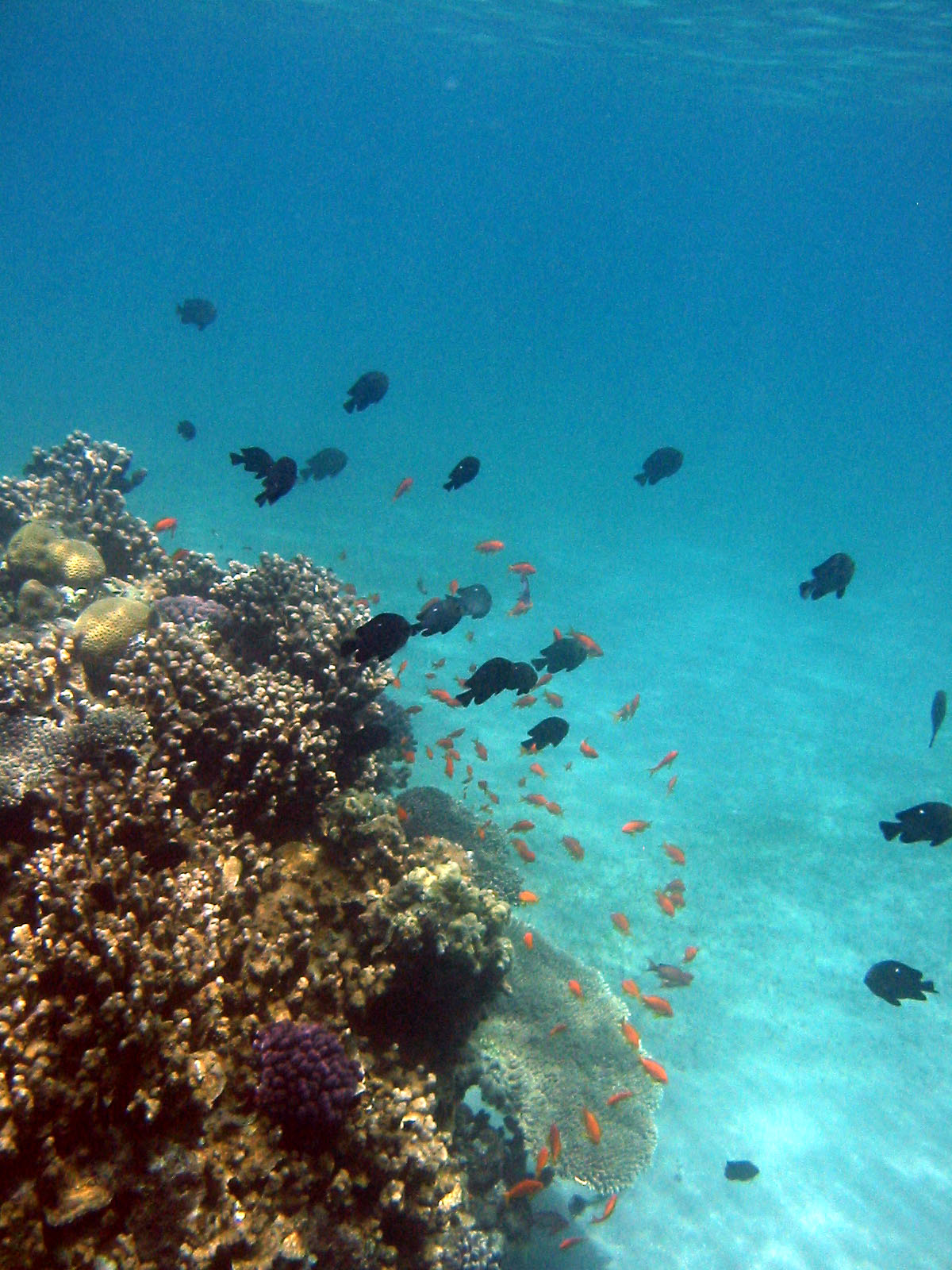 Dascyllus trimaculatus Domino damsel taba egypt